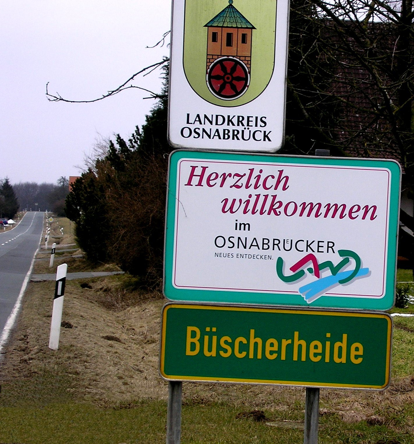 Ortsschild von Büscherheide, einem Ortsteil von Bad Essen in Niedersachsen. Oben das Wappen des Landkreises Osnabrück, in der Mitte Logo und Claim der Region Osnabrücker Land, unten Ortseingangsschild. Büscherheide liegt im Osnabrücker Land und im Naturpark TERRA.vita.